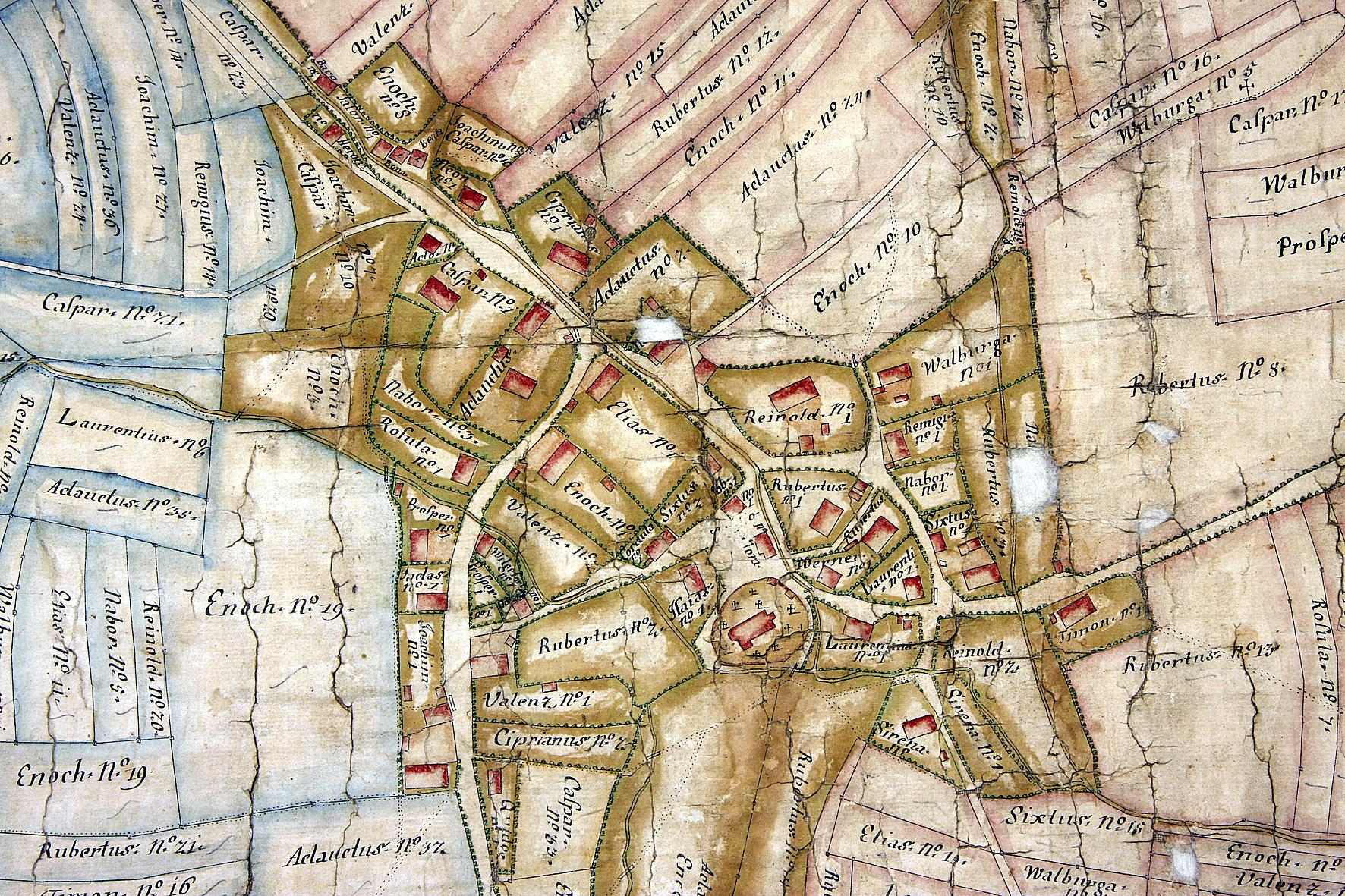 Ortsplan des Dorfes Fleischwangen (Ausschnitt aus der Flurkarte von Franz Anton Stemmer), um 1770. Die Karte ist nicht genordet, der Süden ist oben